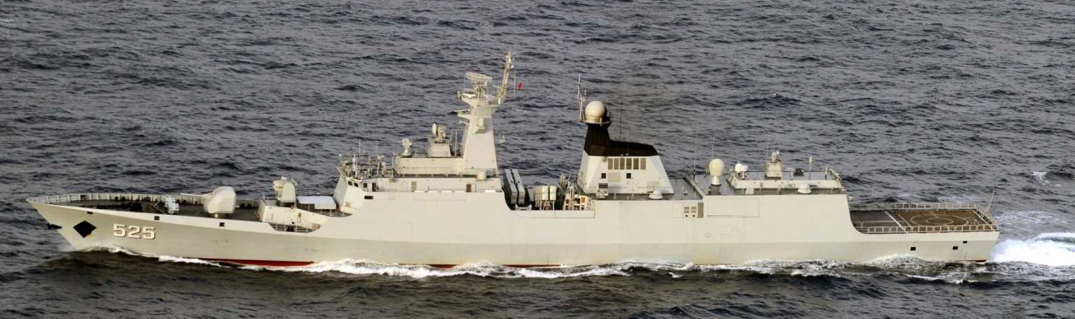 １２月１３日（日）午前５時頃、海上自衛隊第５航空群所属「Ｐ－３Ｃ」（那覇）が、宮古島の北東約１３０ｋｍの海域を東シナ海から太平洋に向けて南東進する中国海軍ジャンカイI級フリゲート２隻を確認した。また、当該艦艇が、同日午後１１時頃、与那国島の南約２２０ｋｍの海域を南西進するのを確認した。